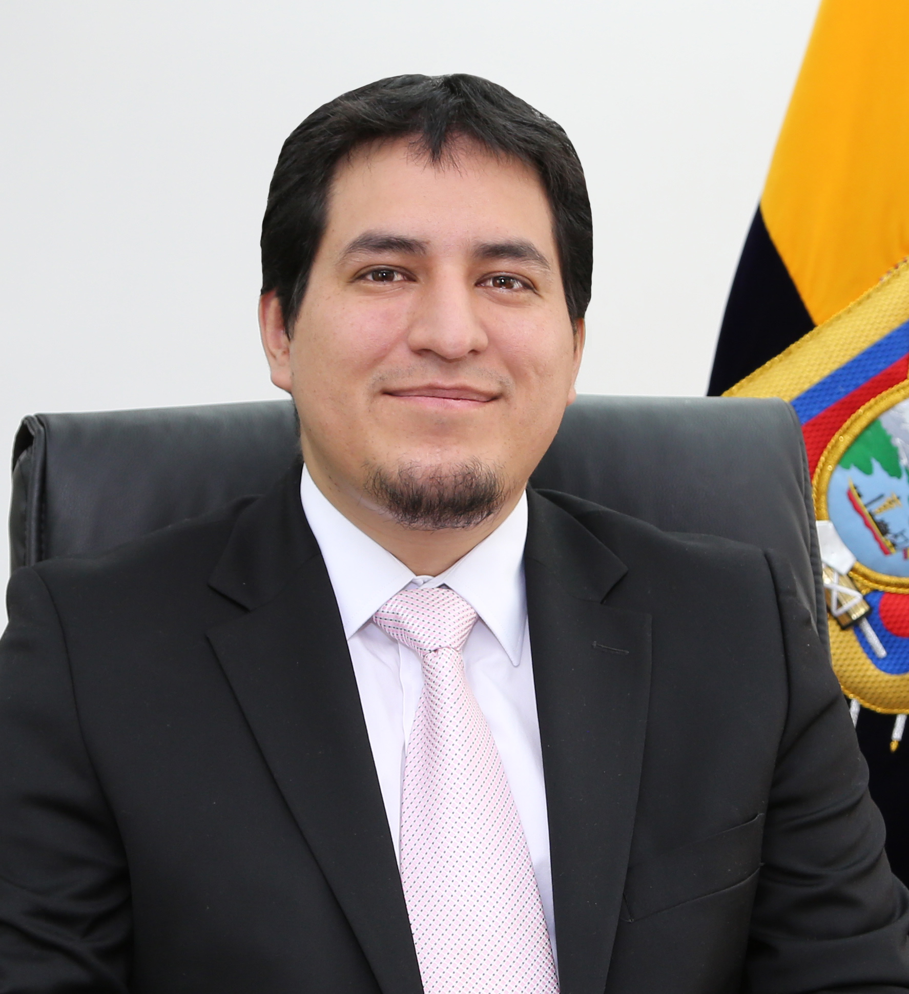 Ministro Coordinador de Conocimiento y Talento Humano